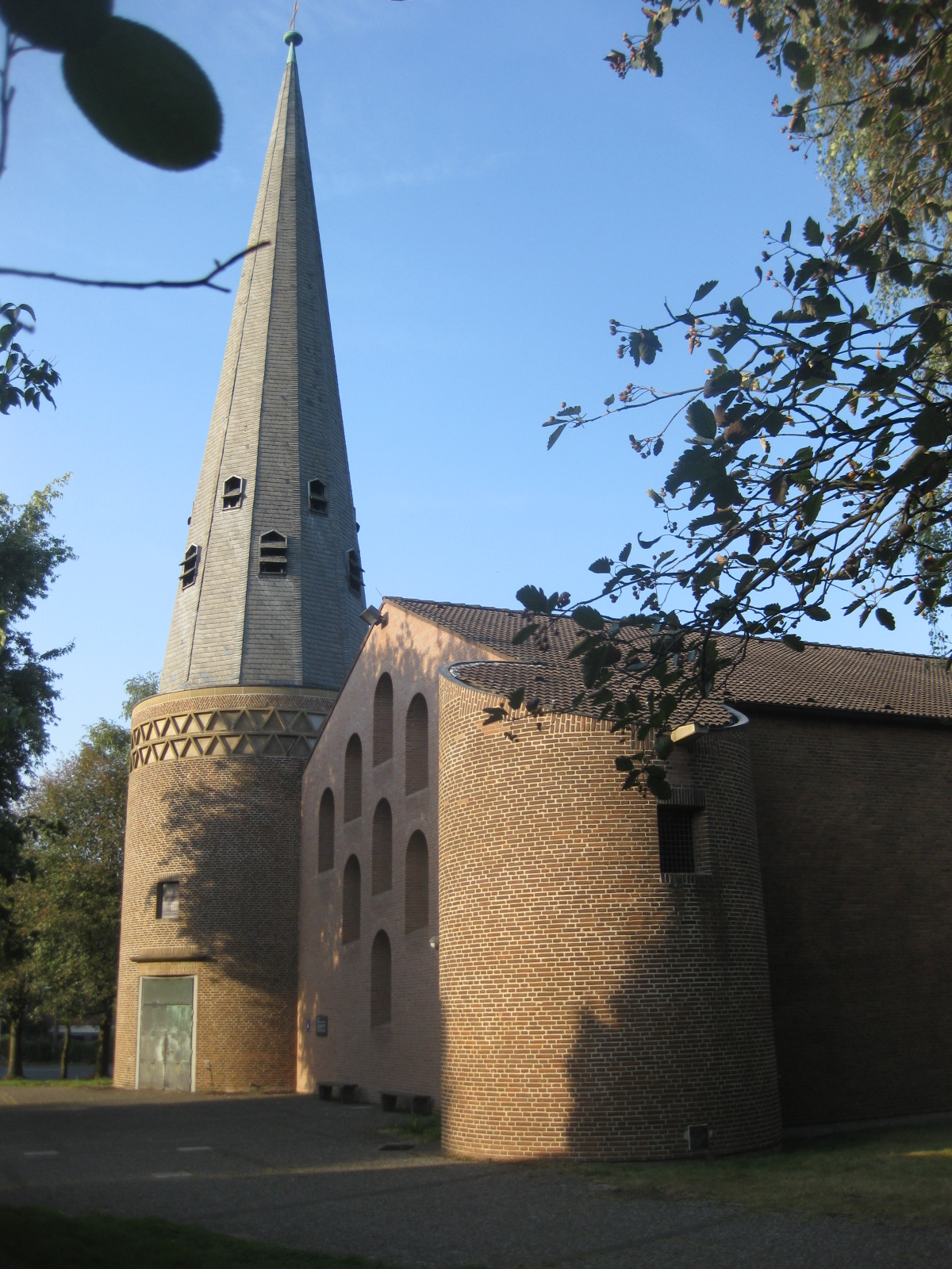 Herausragendes Beispel des evanglischen Sakralbaus in der westdeutschen Nachkriegsmoderne, Architekt Baurat Heinrich Otto Vogel, Trier